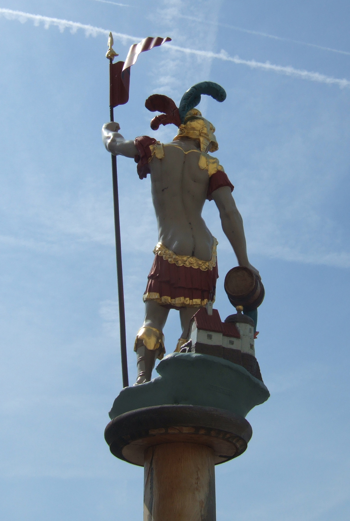 Holzskulptur des Heiligen Florian mit entblößtem Hintern in Bad Tölz.